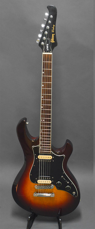 Gibson Victory MVII